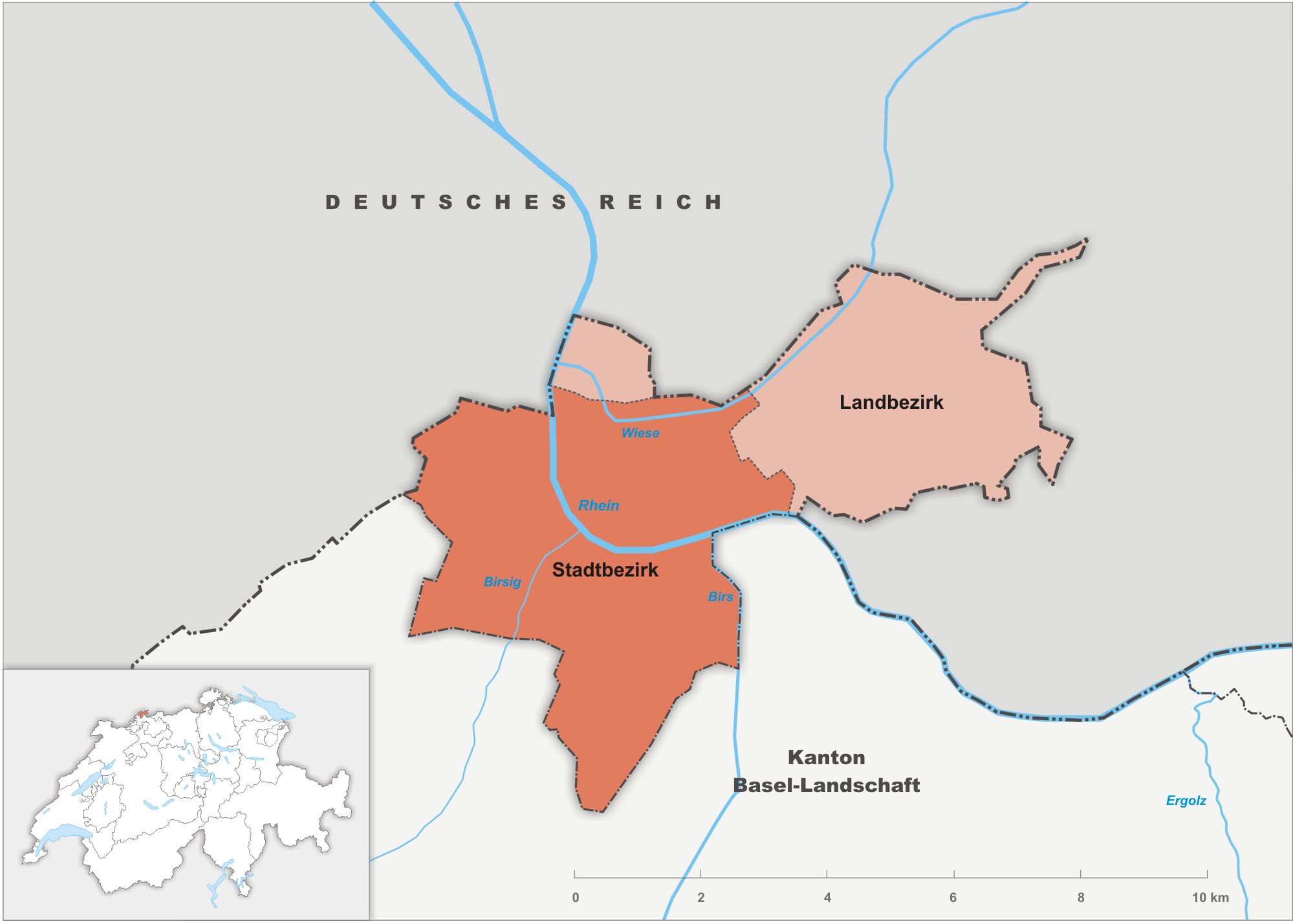 Bezirke des Kanton Basel-Stadt bis 1889